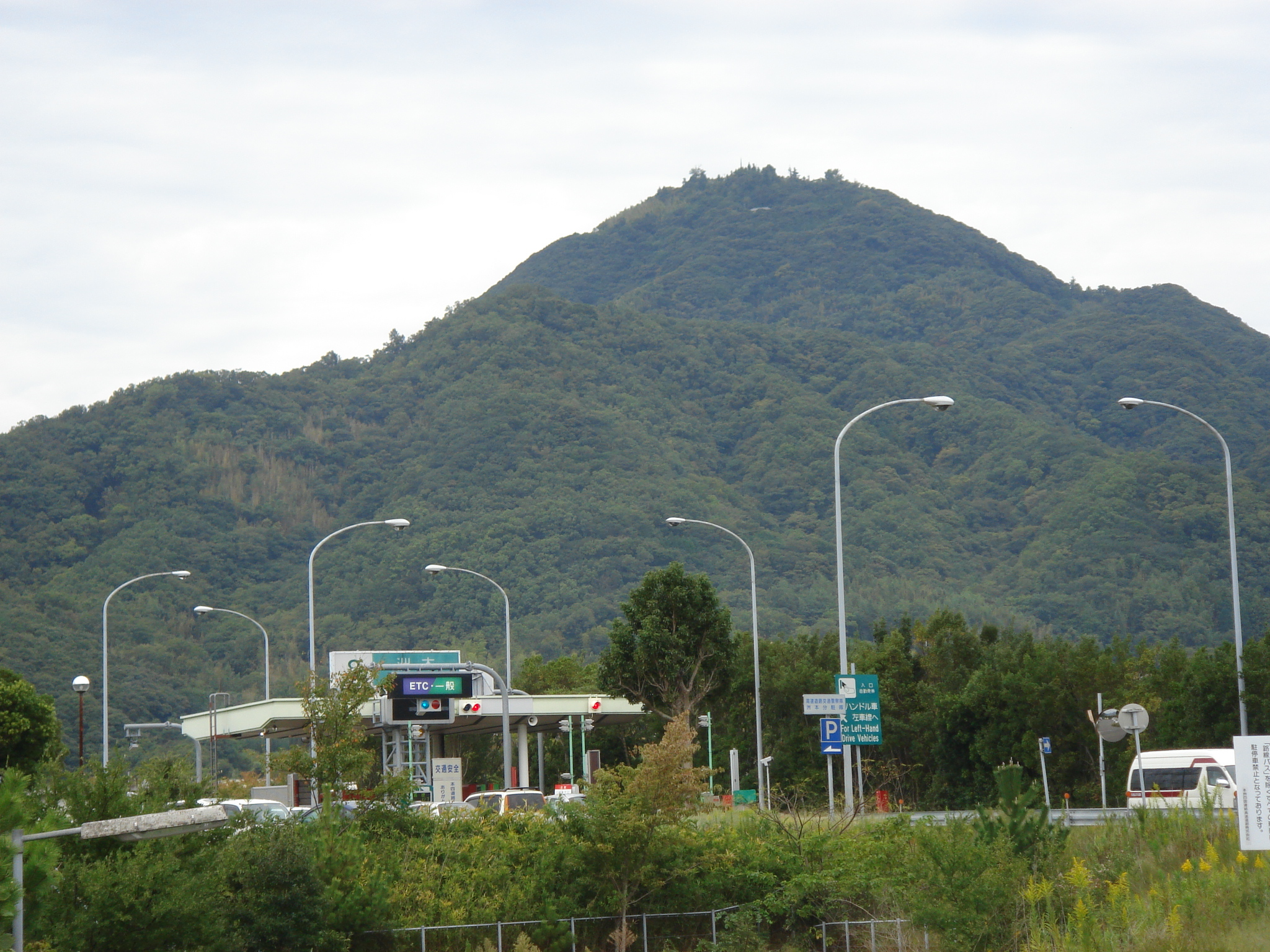 洲本インターチェンジと奥には先山